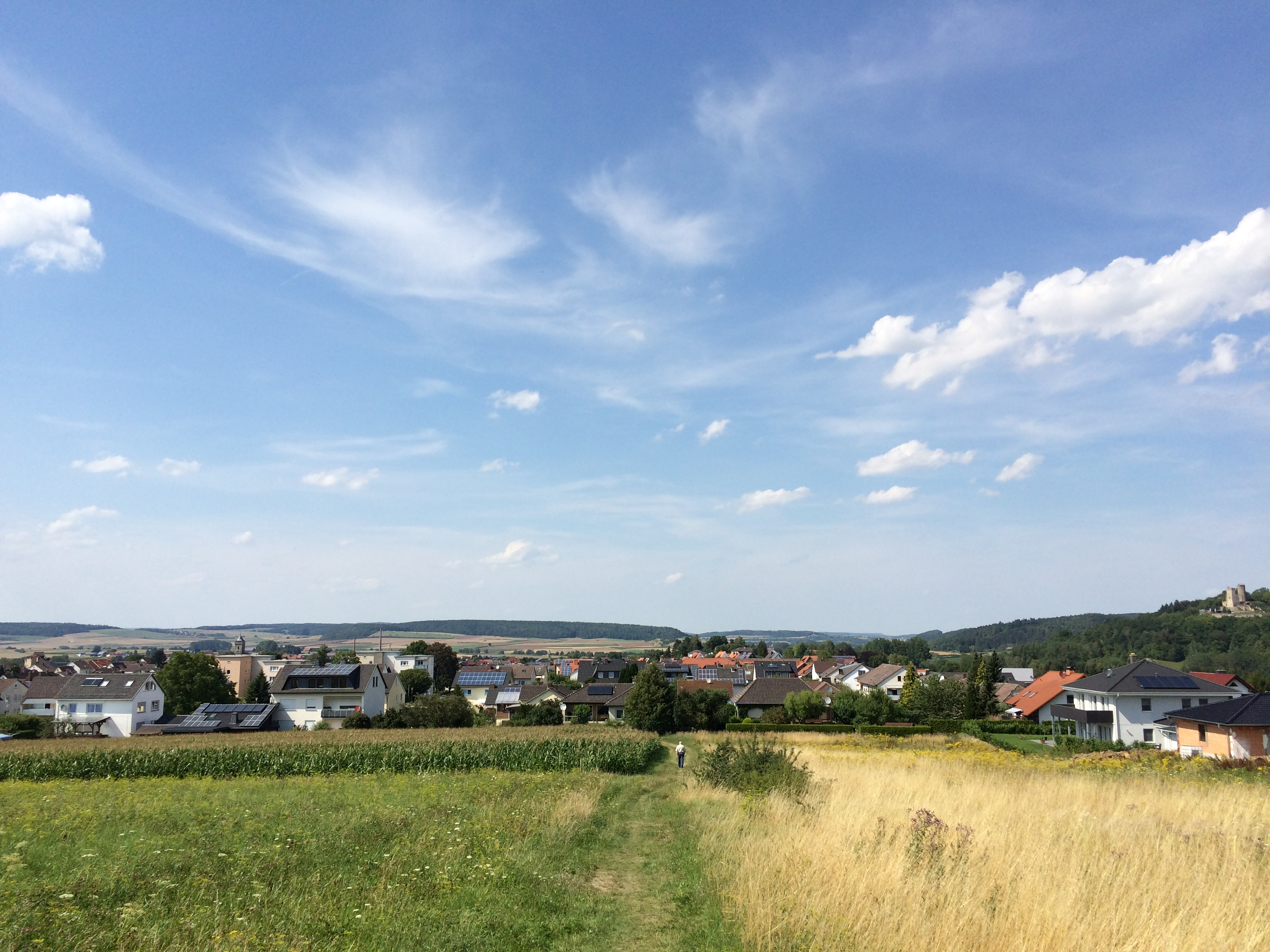 Der Volkmarser Weg (V) zwischen der Scheidwartstraße und der Eichenstraße in Volkmarsen